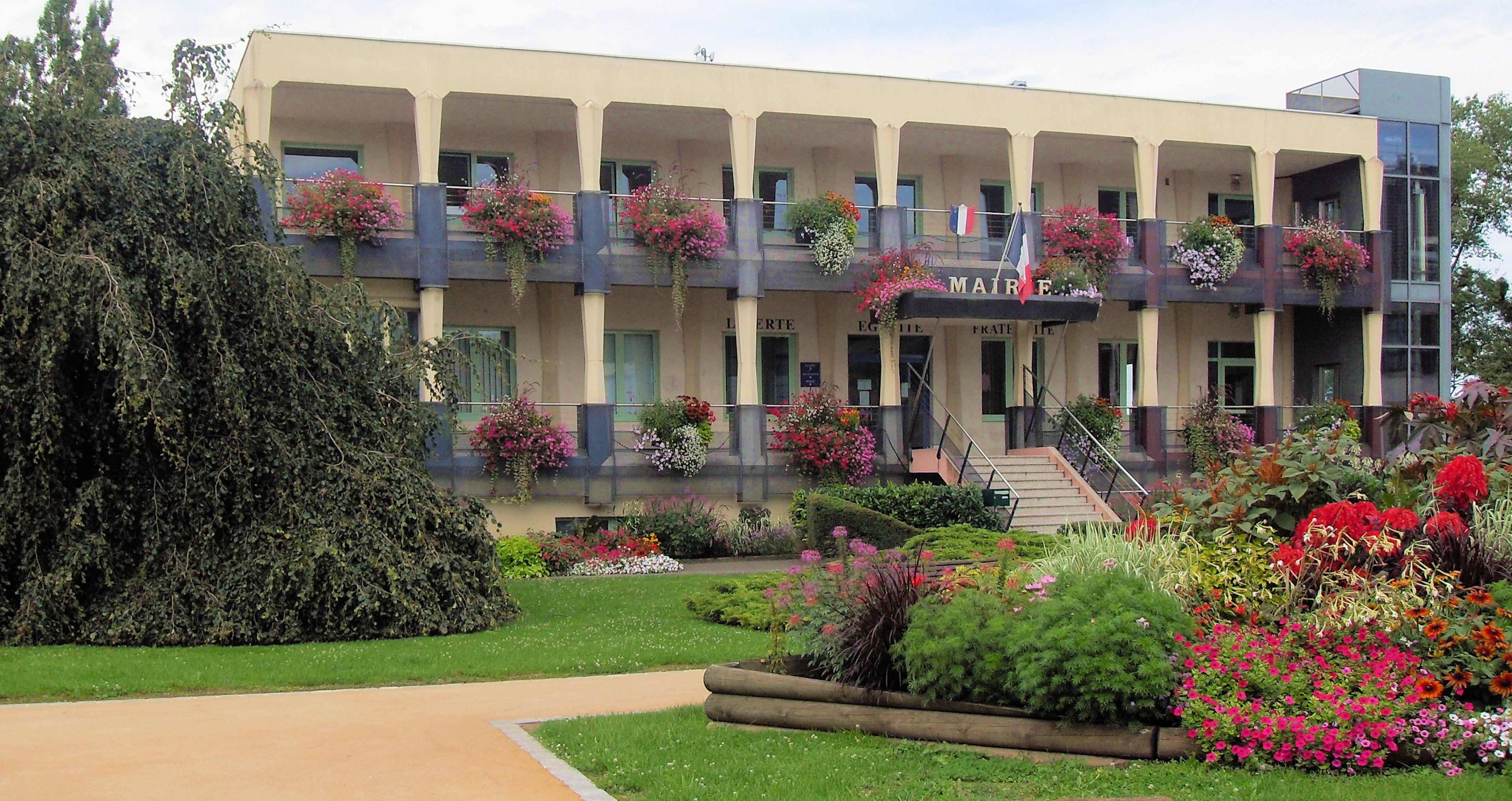 La mairie de Voujeaucourt